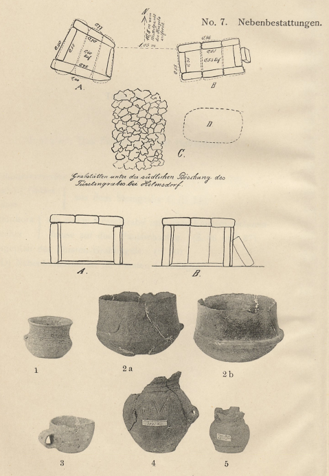 Fürstengrab von Helmsdorf